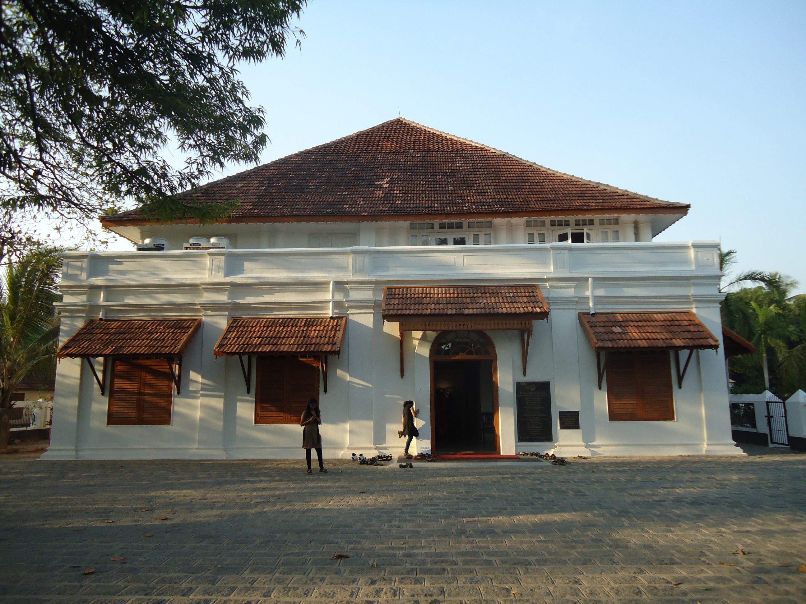 Kerala Lalithakala Academi Durbar Hall Ground